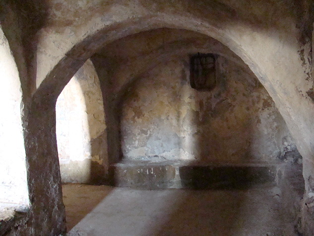 Synagogue in Yefren, Libya